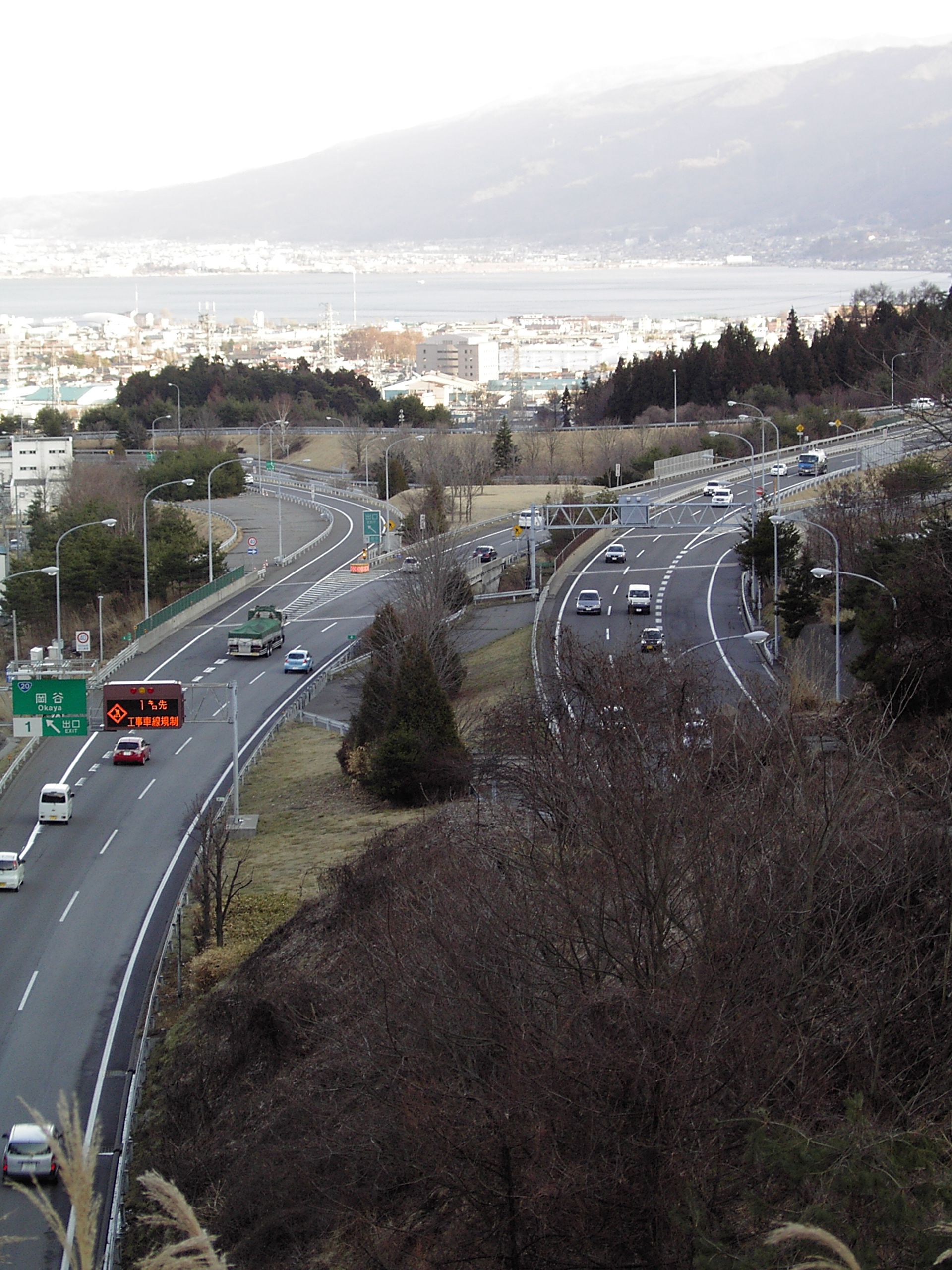 長野道2